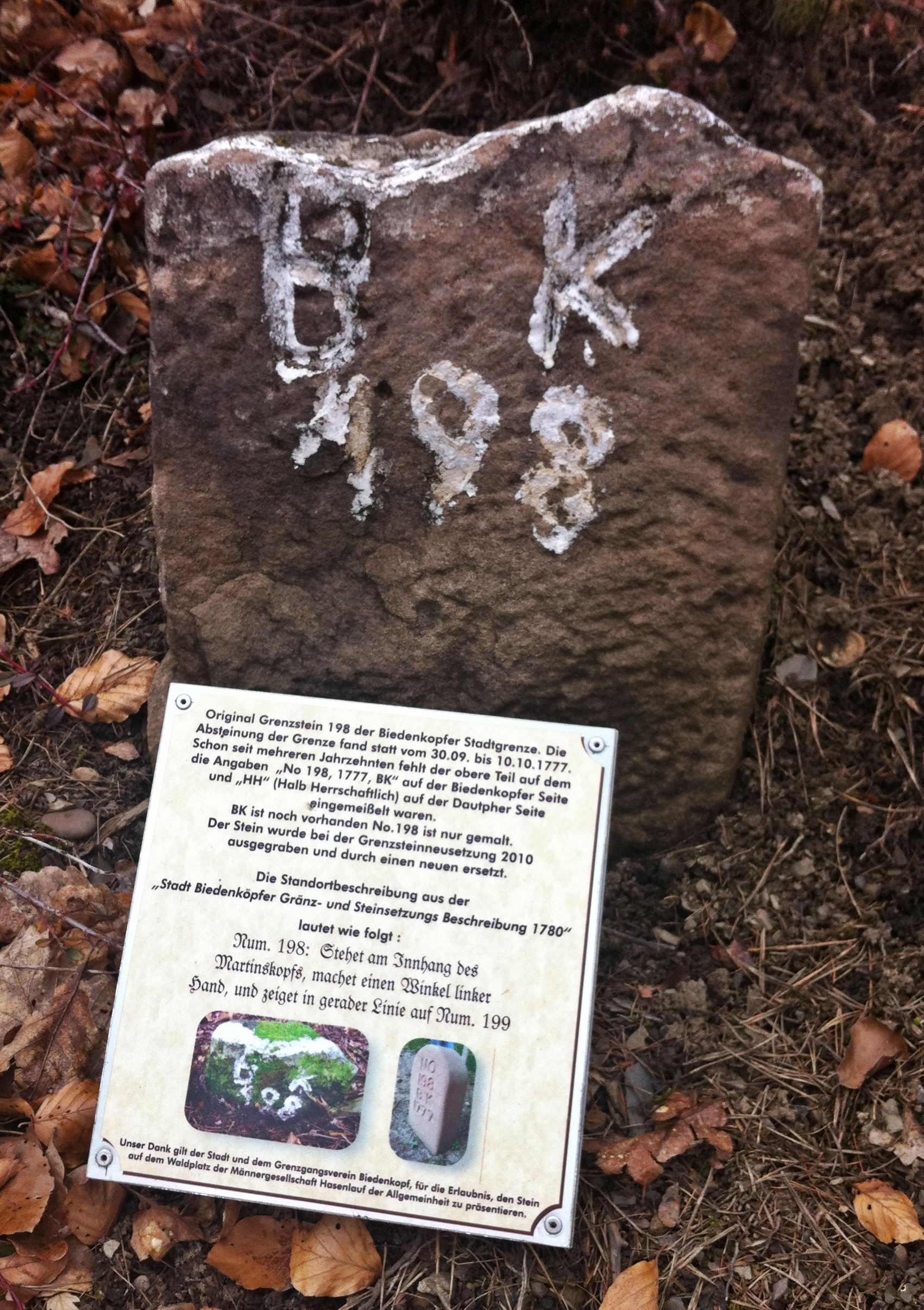 Deutschland, Hessen, Biedenkopf: Teil eines Grenzsteins von 1777. Nachdem dieser an seinem ursprünglichen Standort auf der Grenze ersetzt wurde, ist er nun auf dem Waldplatz der Männergesellschaft Hasenlauf zu besichtigen.